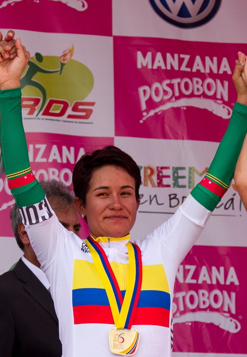 Ana Cristina Sanabria, ciclista colomiana